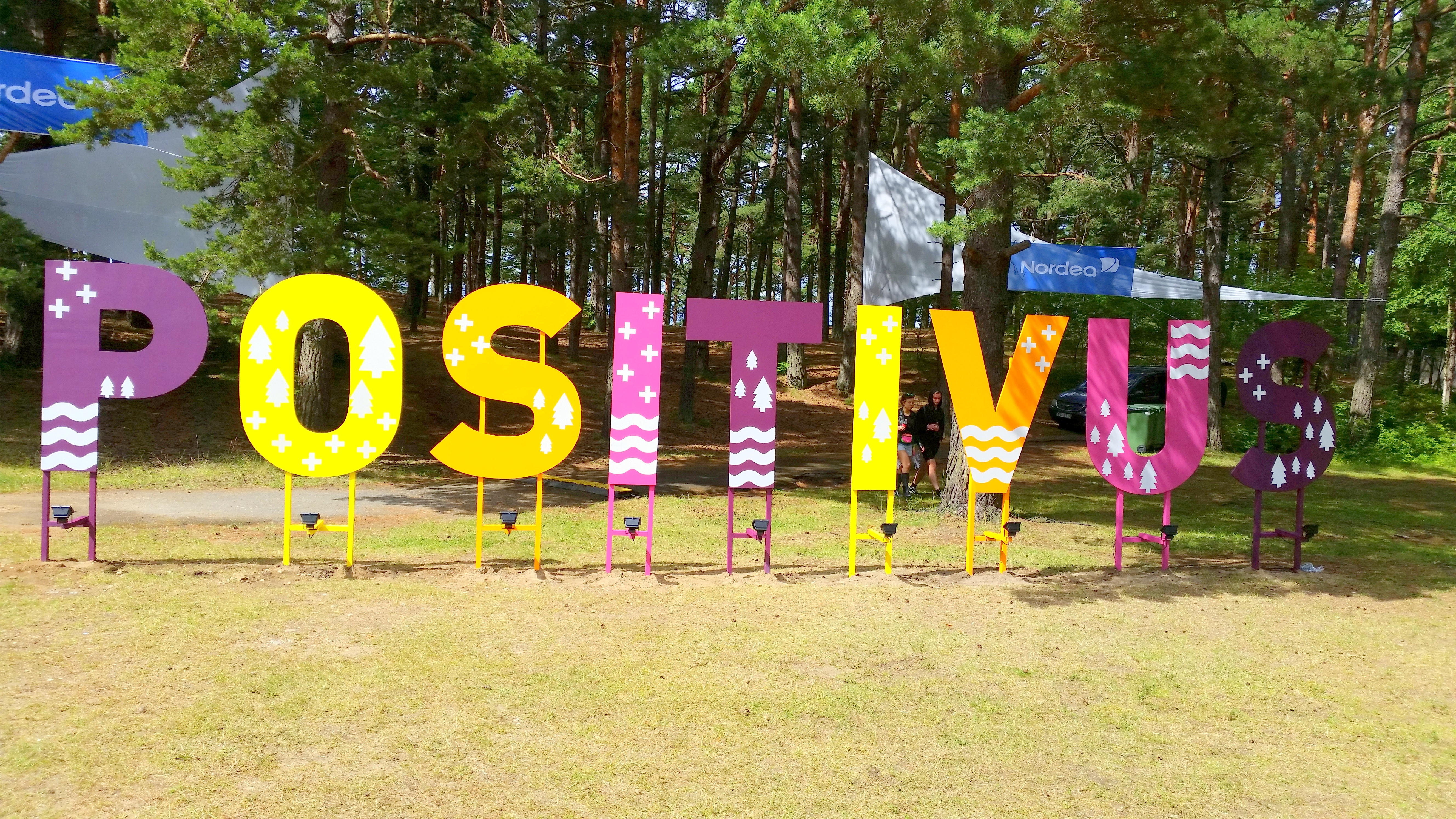 Positivus 15'